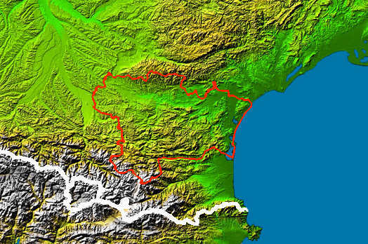 Image radar du département de l'Aude à partir de la France vue depuis la navette spatiale, par la NASA